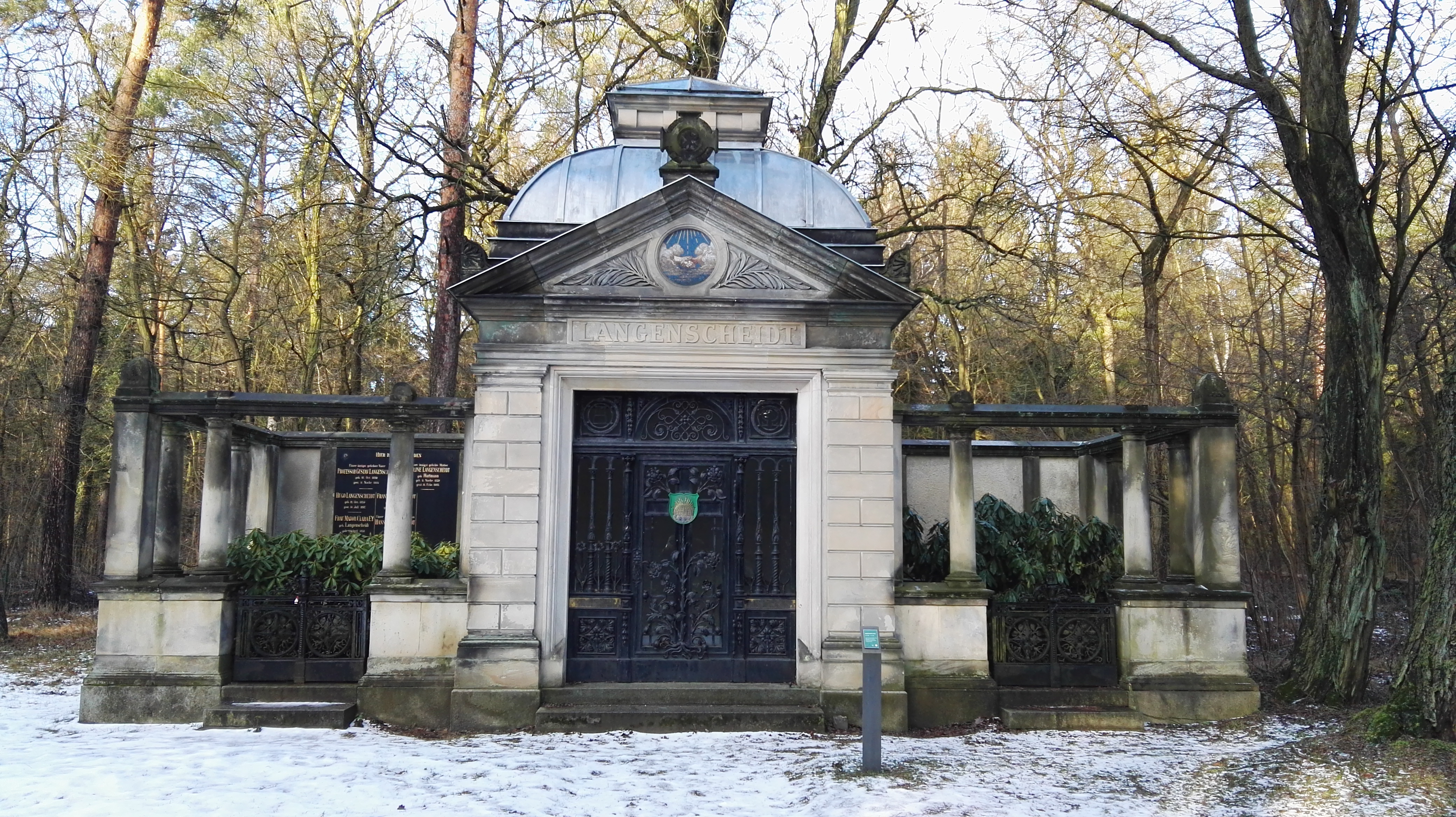 Familiengrab von Gustav Langenscheidt auf dem Südwestkirchhof Stahnsdorf